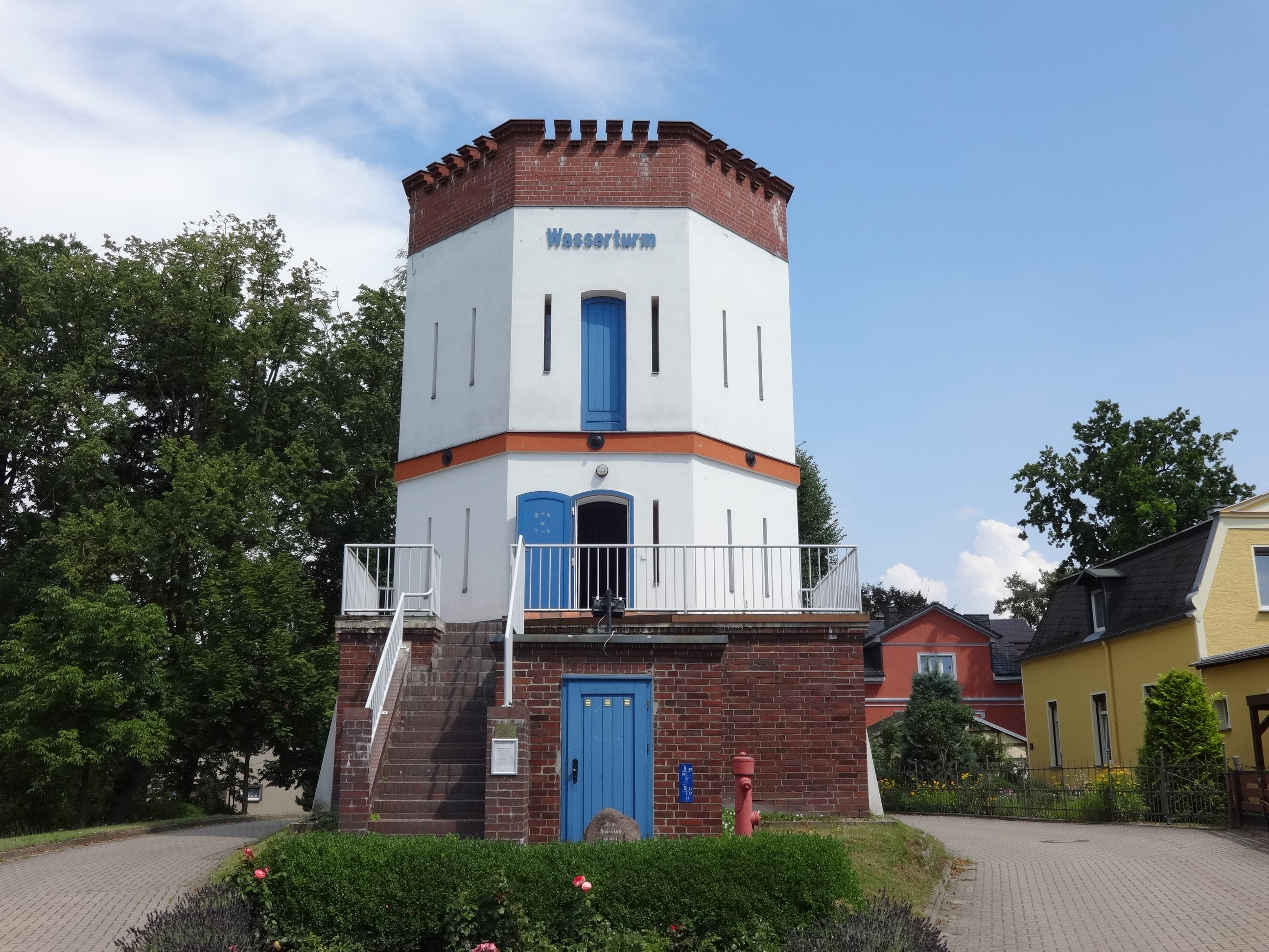 Wasserturm in Waldsieversdorf, errichtet um 1900 von Ferdinand Kindermann, dem Begründer des Dorfes zur Versorgung der Bevölkerung mit Trinkwasser. Im Erdgeschoss befindet sich die Technik, im Obergeschoss ein 70.000 Liter fassendes Becken. Der Turm ist heute ein technisches Denkmal.